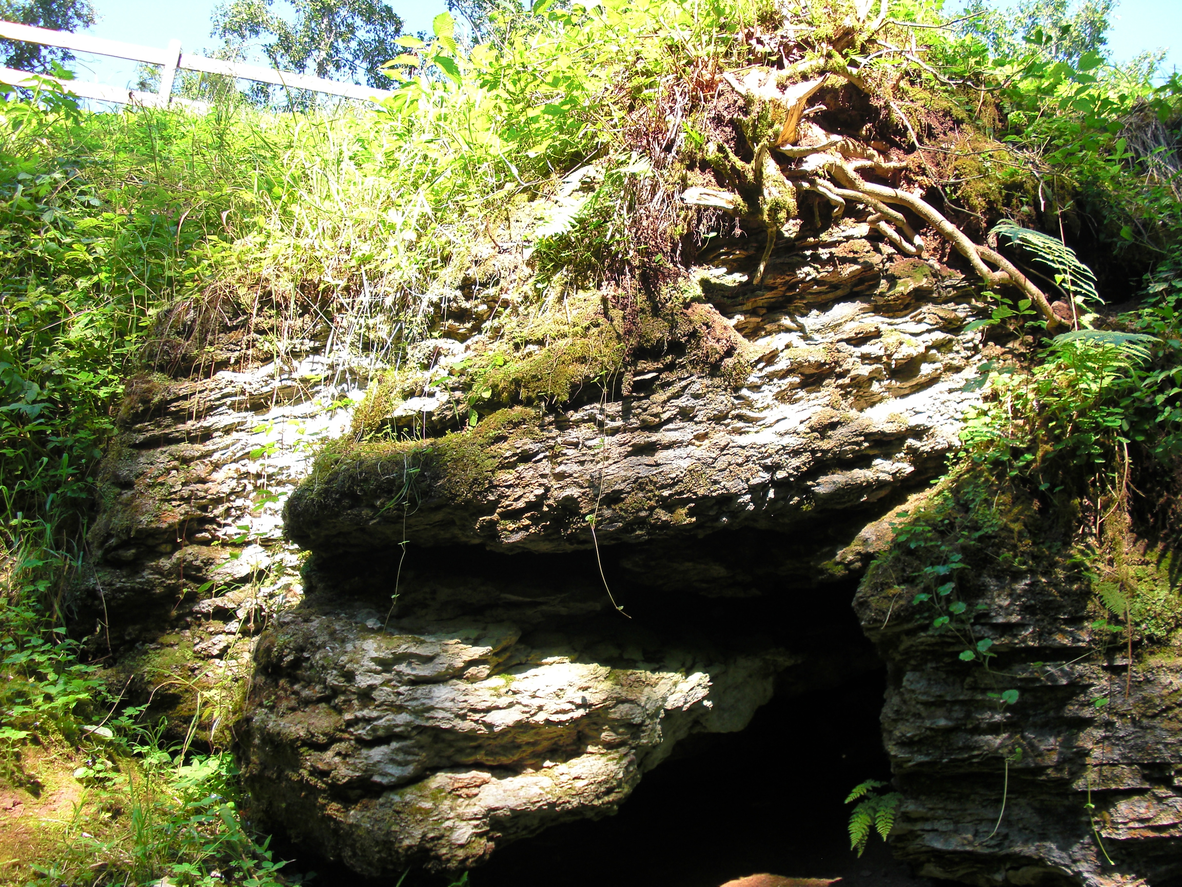 Karvės ola